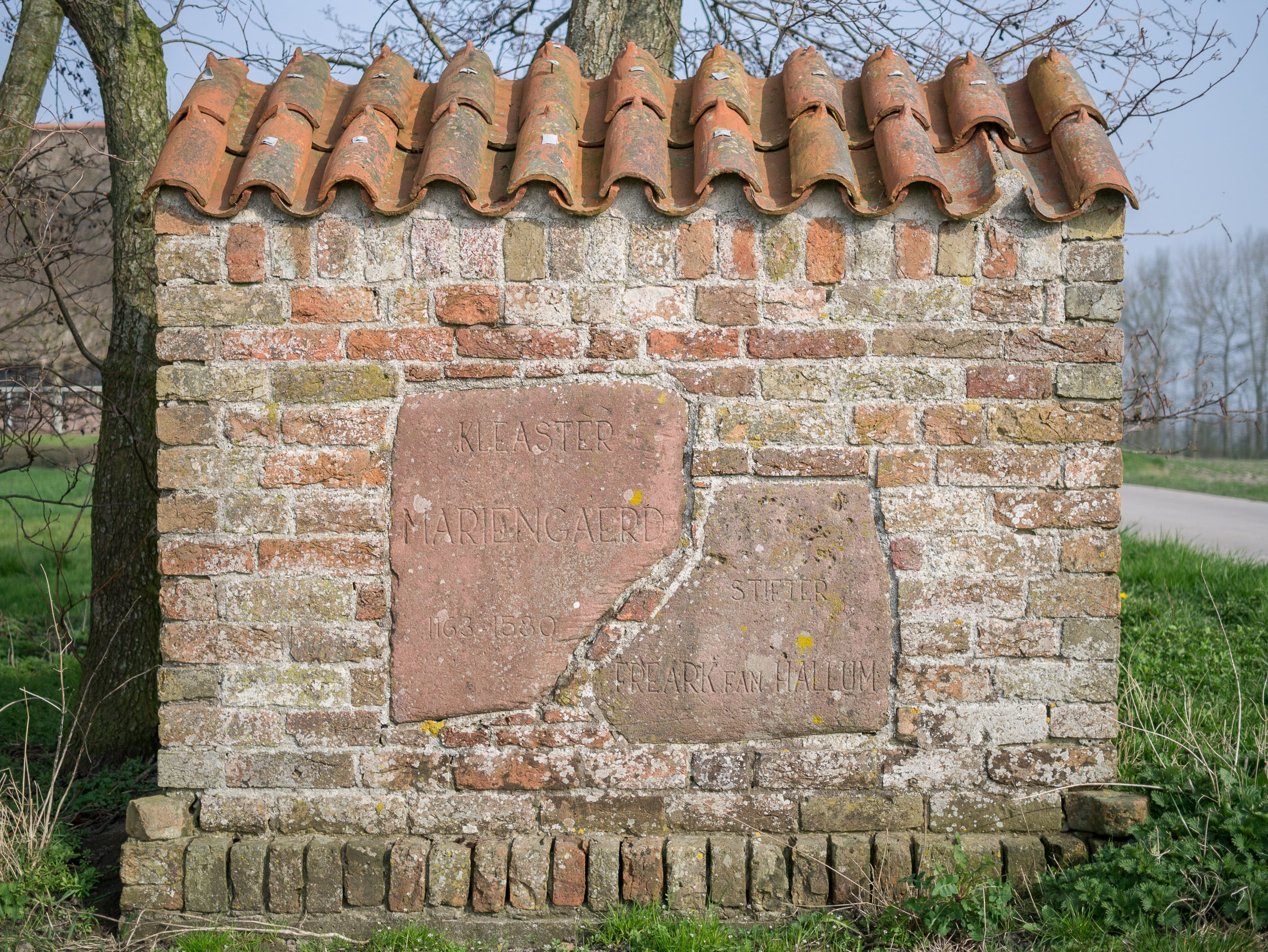 Herinnering aan klooster Mariëngaarde bij Mariëngaarde boerderij